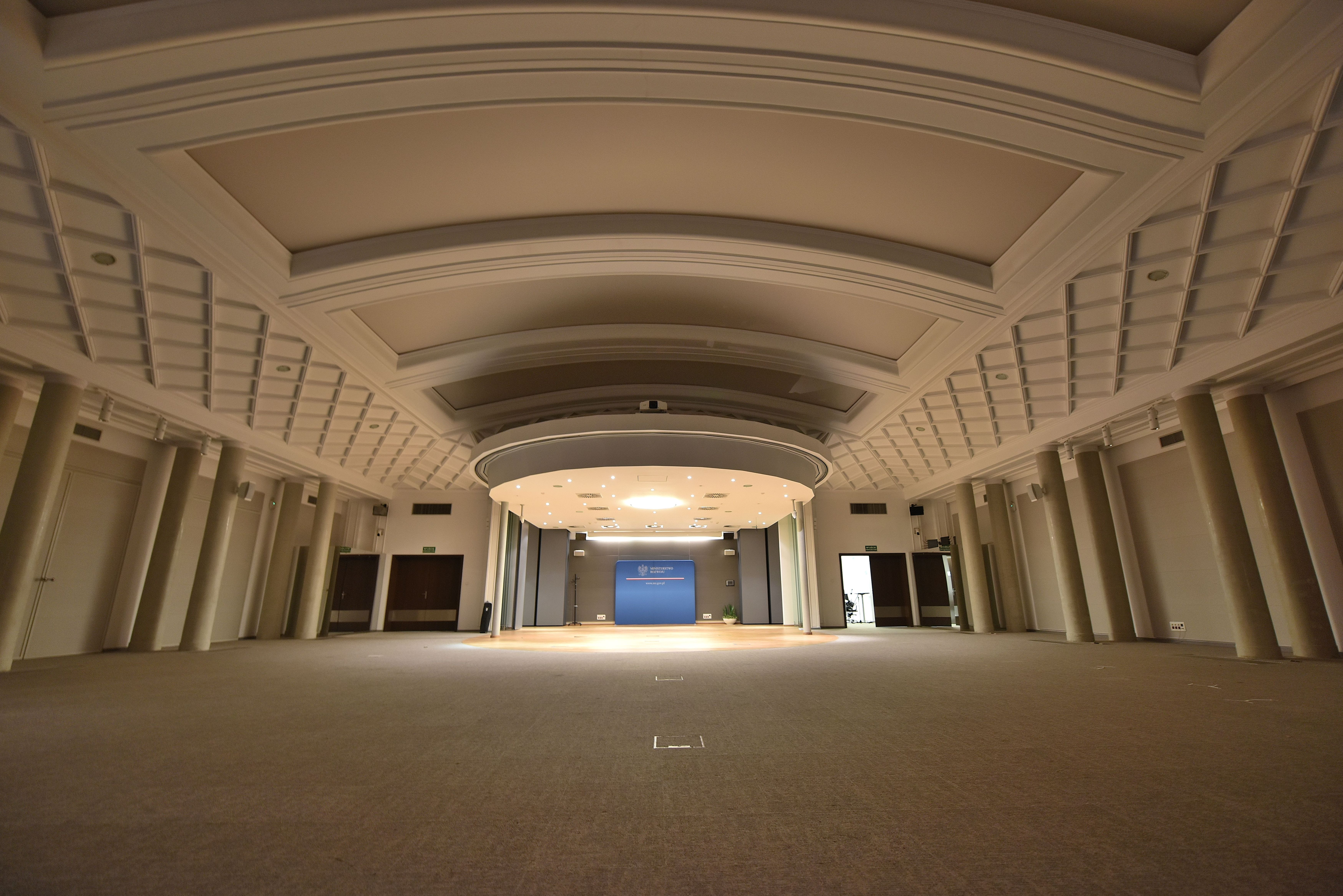 Budynek Ministerstwa Rozwoju przy ul. Współnej 2/4. Dawne kino "Śląsk" w Warszawie, obecnie sala konferencyjna im. Grażyny Gęsickiej.